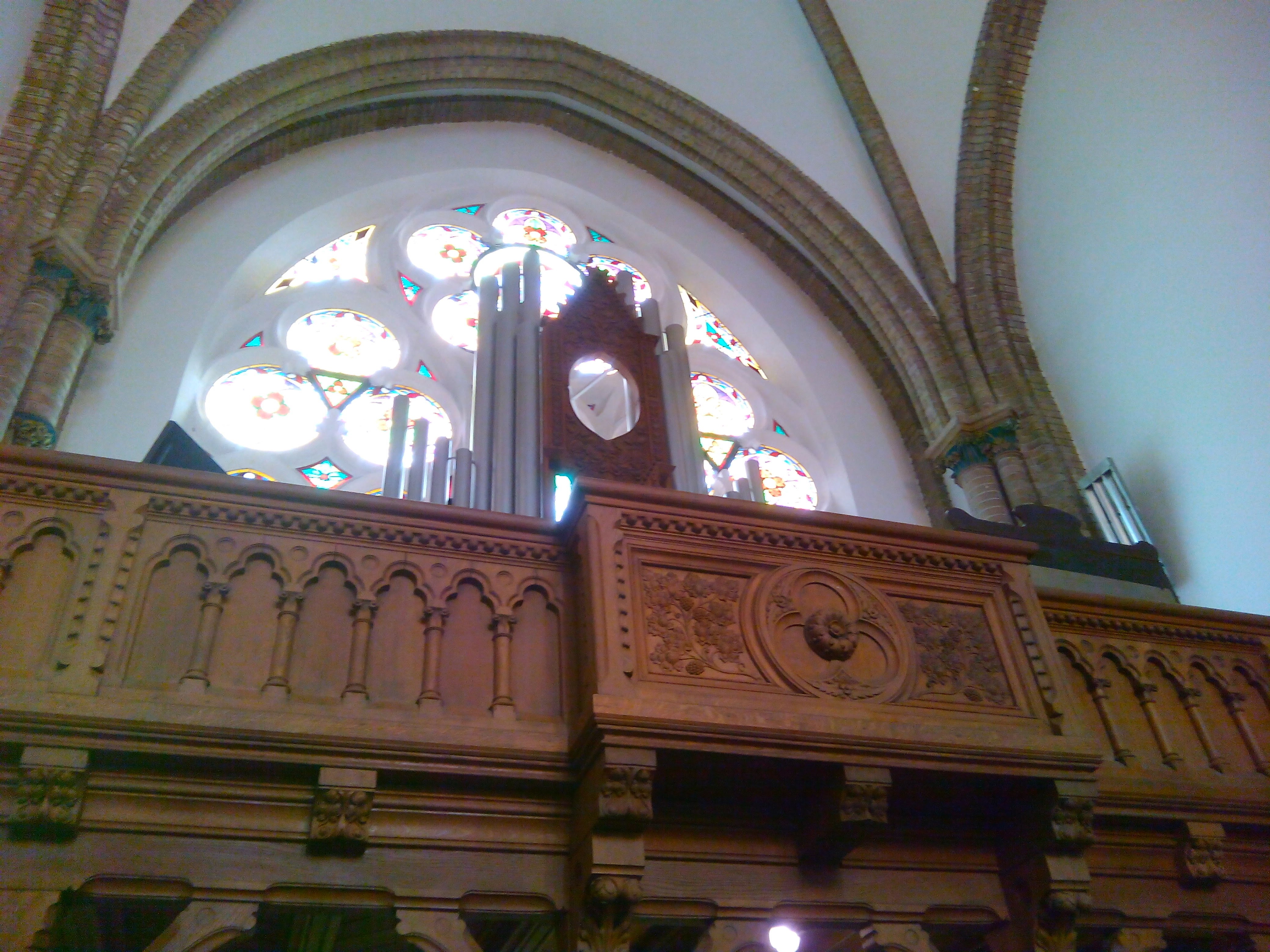 Budapest unitárius templom orgona és karzat